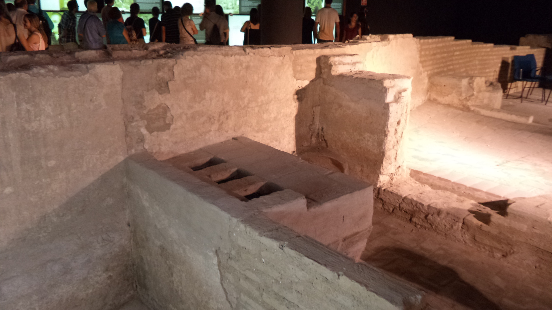 Cocina en el Castillo de San Jorge de Sevilla